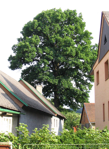 Dub u Houšků schovaný v zahradě za domem